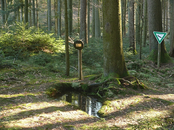 Berrothsbrunnen, Quelle der Bühler, bei Pommertsweiler